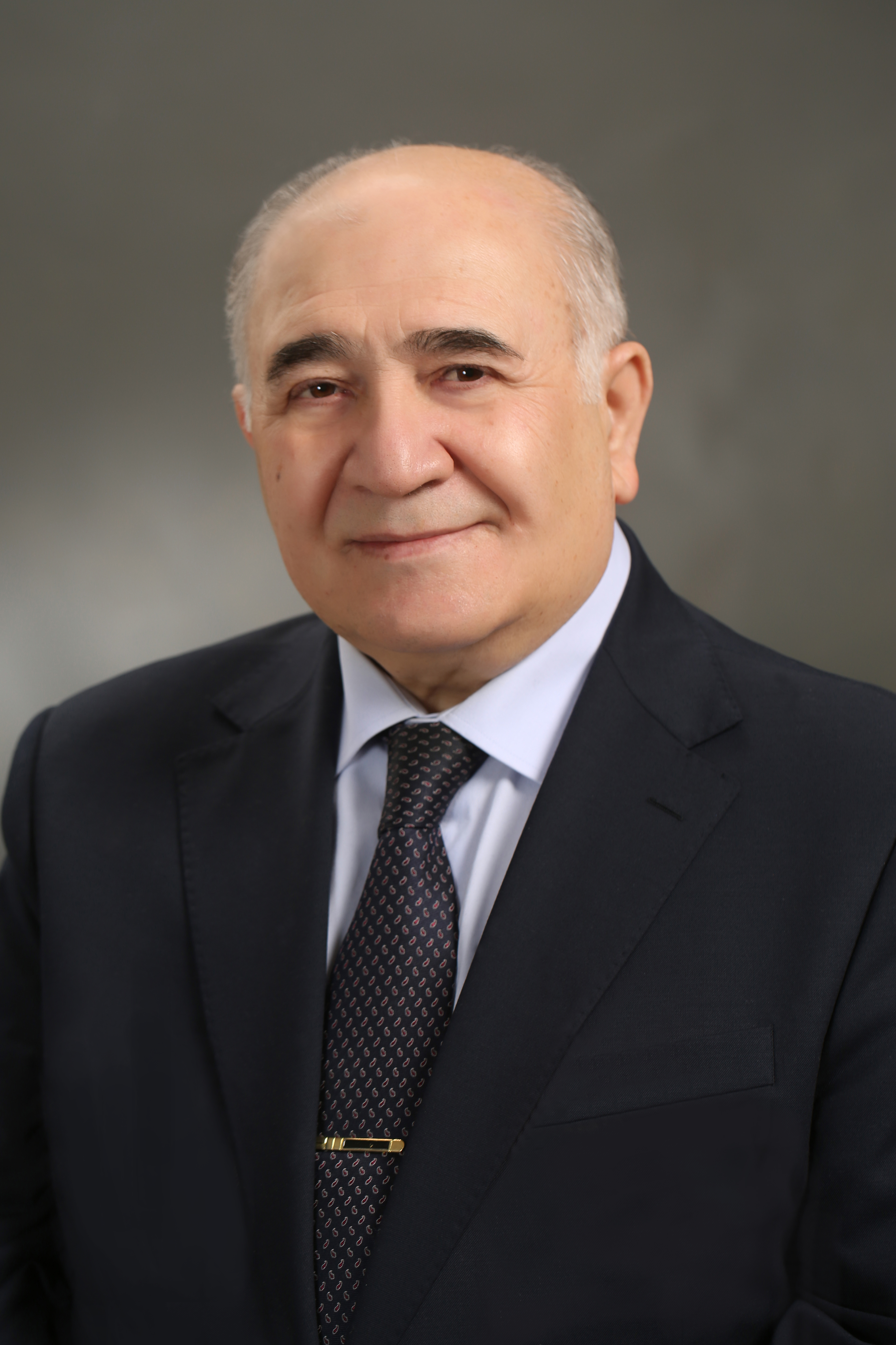 Deitsch: Aladdin Allawerdiew